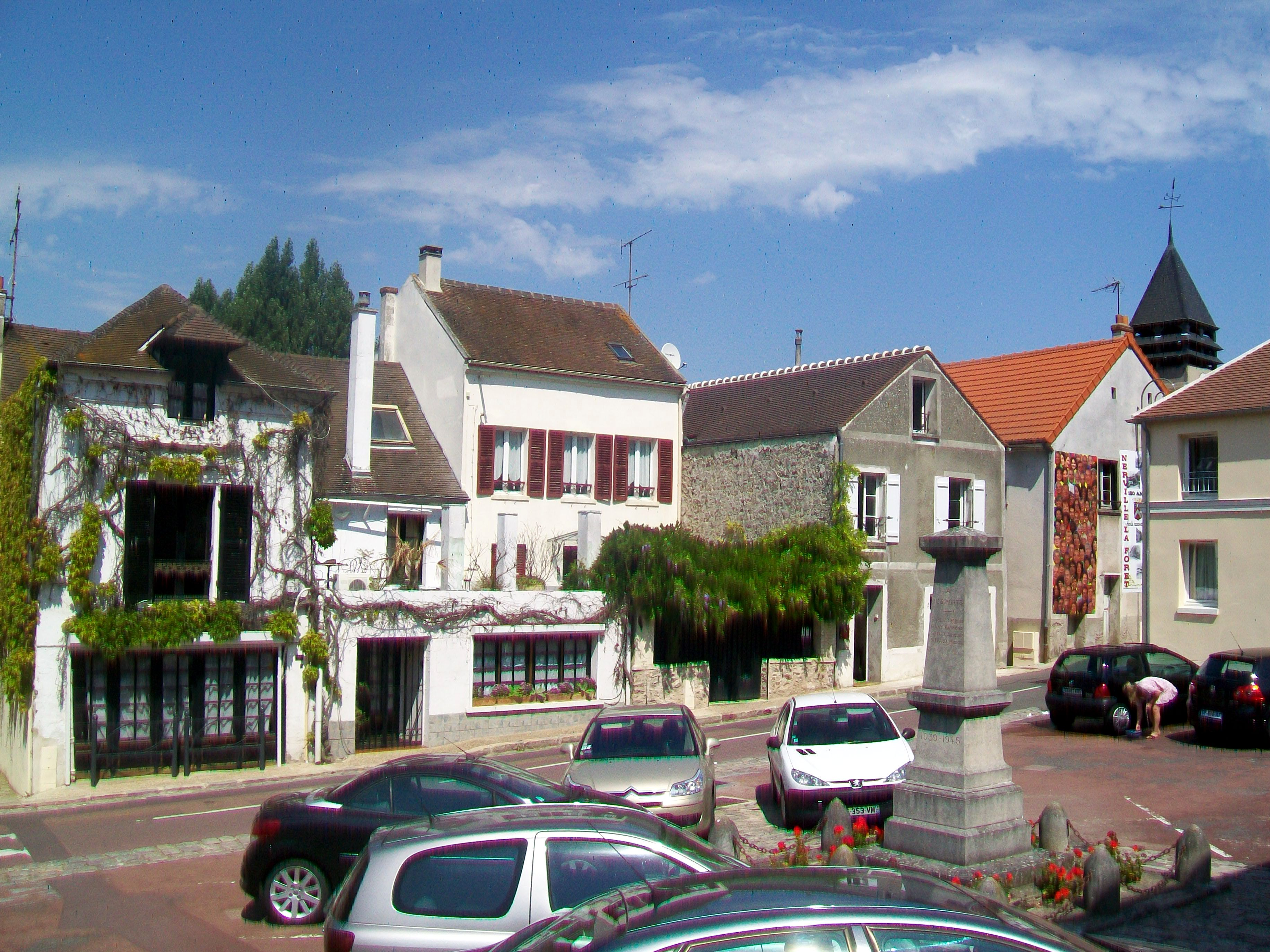 Place du village - anciens commerces, rue Saint-Claude.